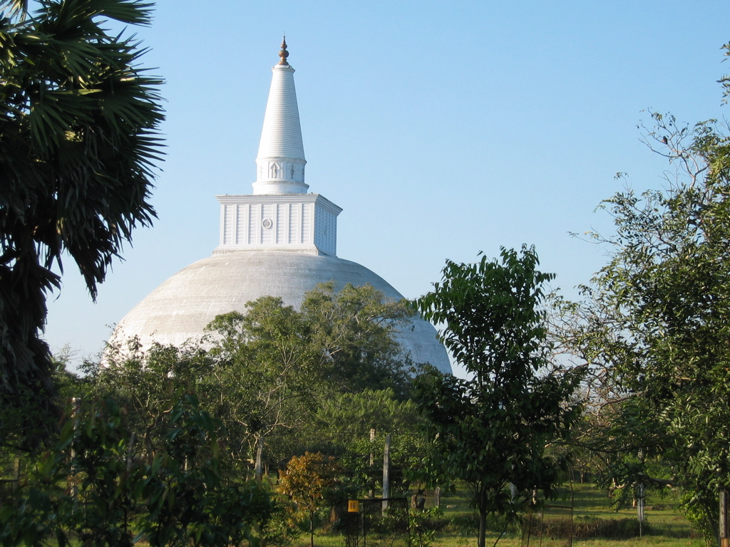 Sri Lanka, Anuradhapura, Ruvanvelisaya Dagoba